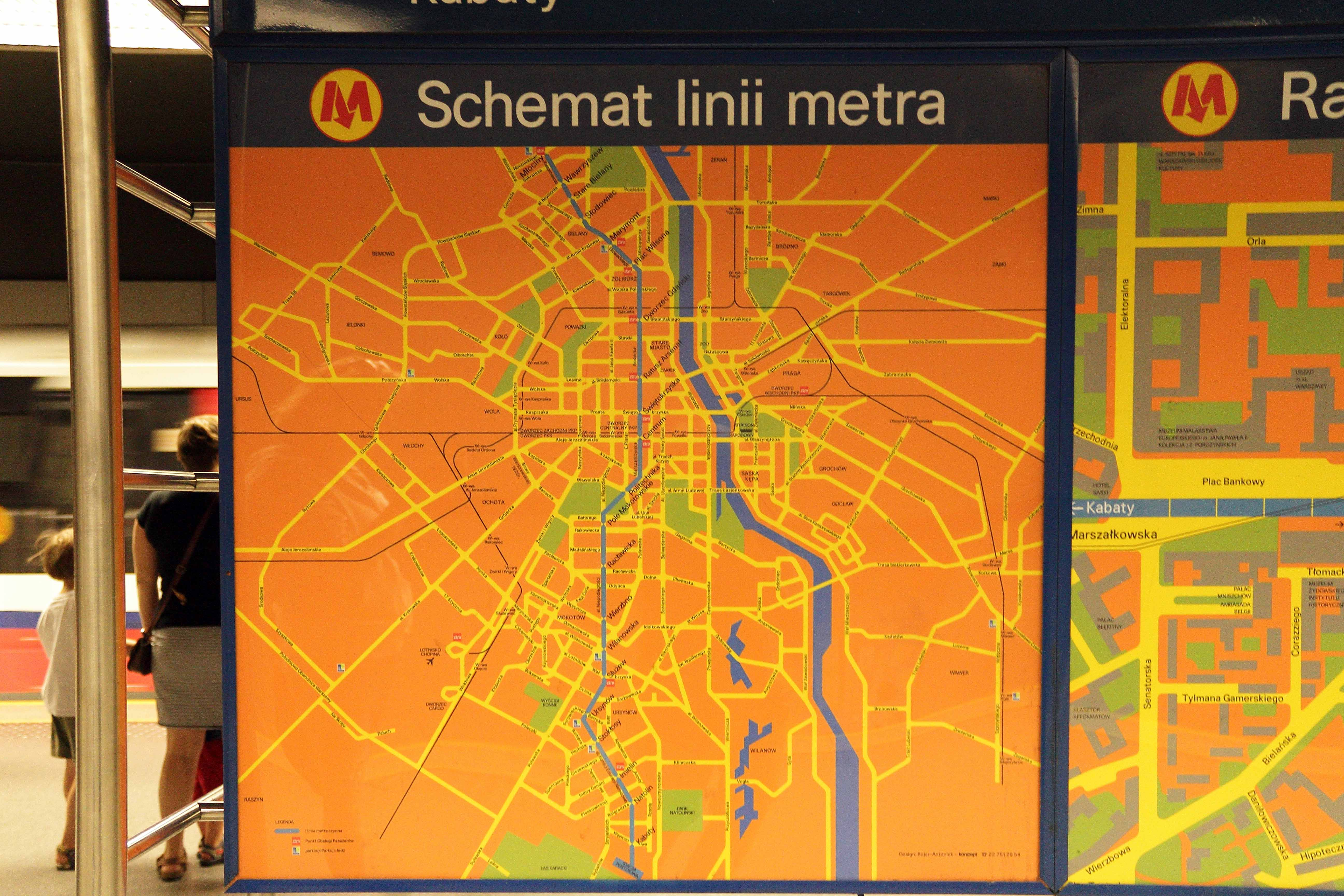 Schemat linii metra